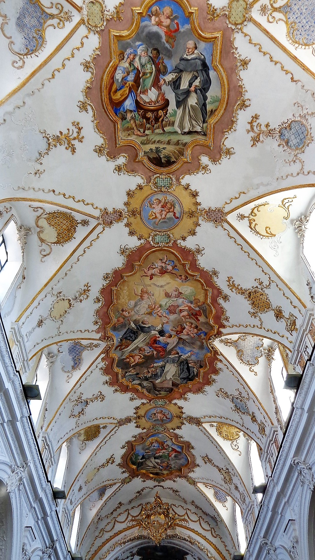 Navata